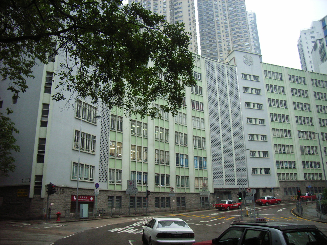 香港明愛 Caritas Hong Kong, Caine Road, Hong Kong photo by Miai